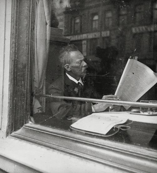 Zeitungslesender Gast im Kaffeehaus, Wien